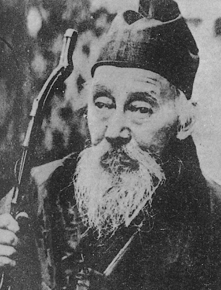 Portrait of Tomioka Tessai (富岡鉄斎, 1837 – 1923)